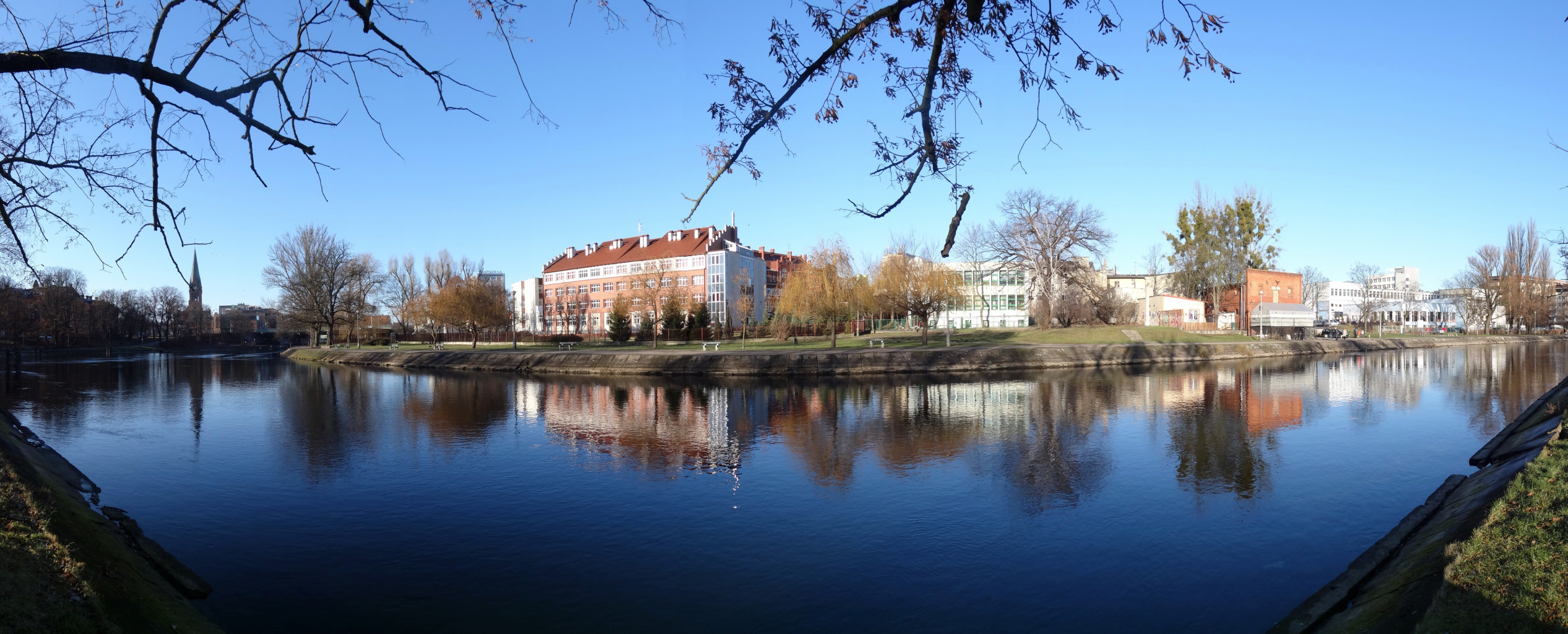 Brda w Bydgoszczy w pobliżu mostu Bernardyńskiego i szpitala obserwacyjno-zakaźnego